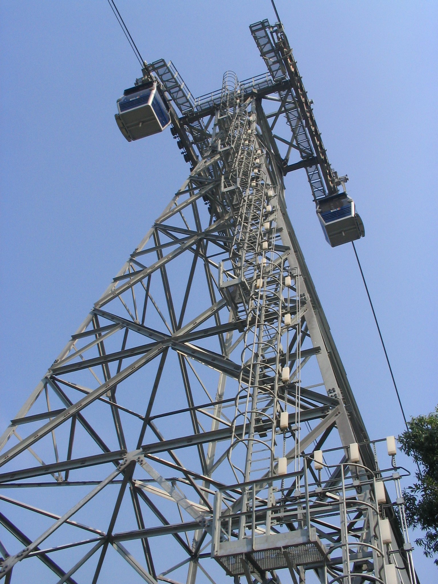 昂坪360-近東涌纜車站(T1塔) Ngong Ping 360 near Tung Chung Skyrail Terminal (T1)